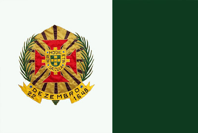 Bandeira do Município de Alcântara, Estado do Maranhão, Brasil.